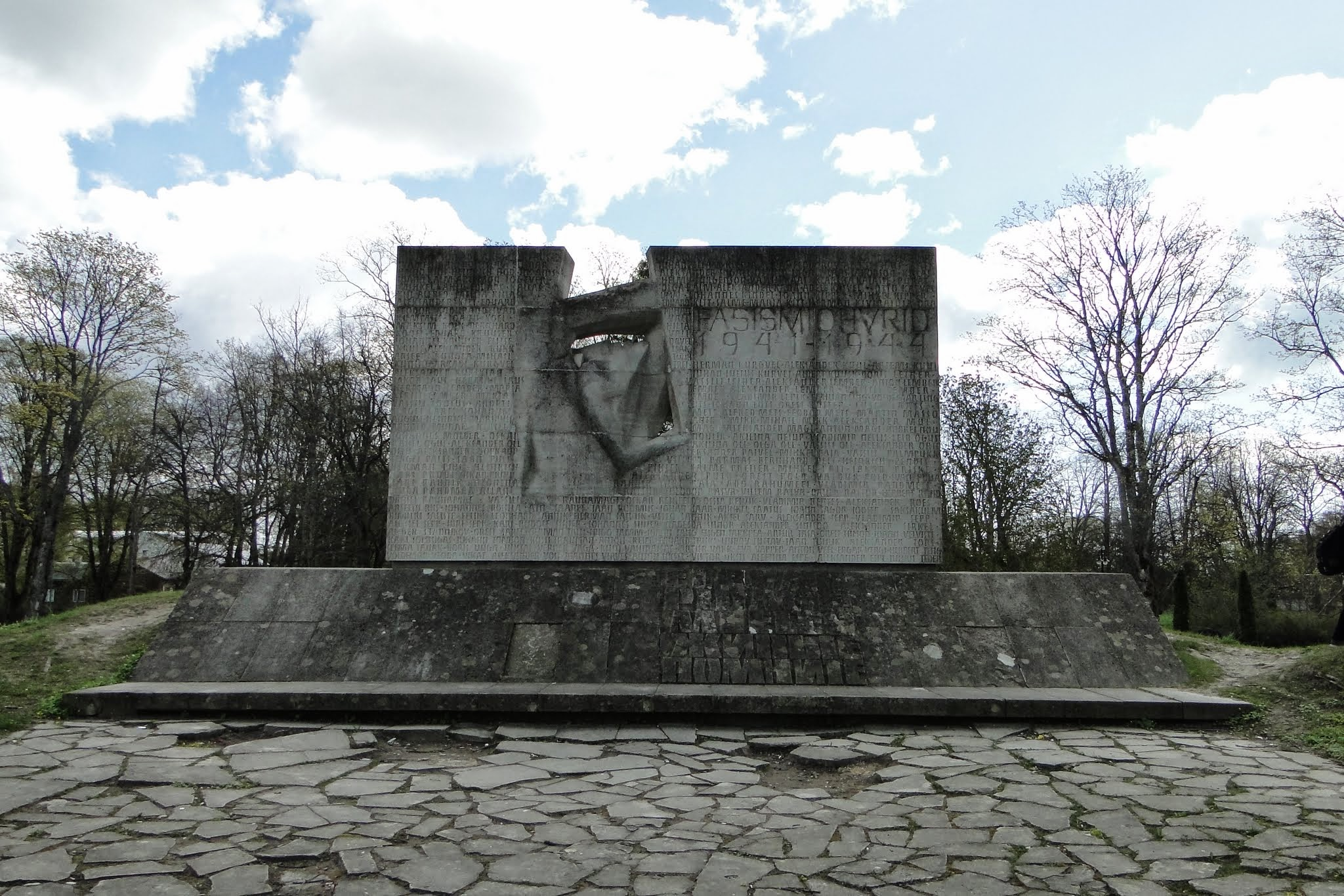 Мемориал защитникам и освободителям острова Сааремаа